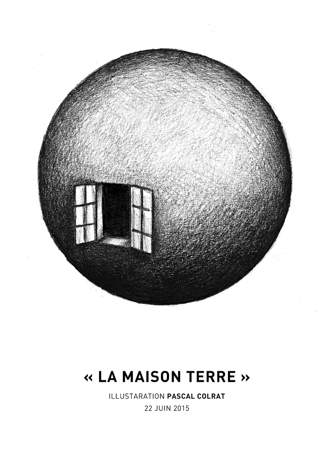 Dessin Pascal Colrat